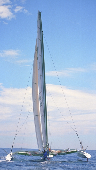 Fujicolor devant Genes, au depart de la Course de l'Europe 1999